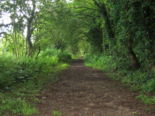 Paston Way